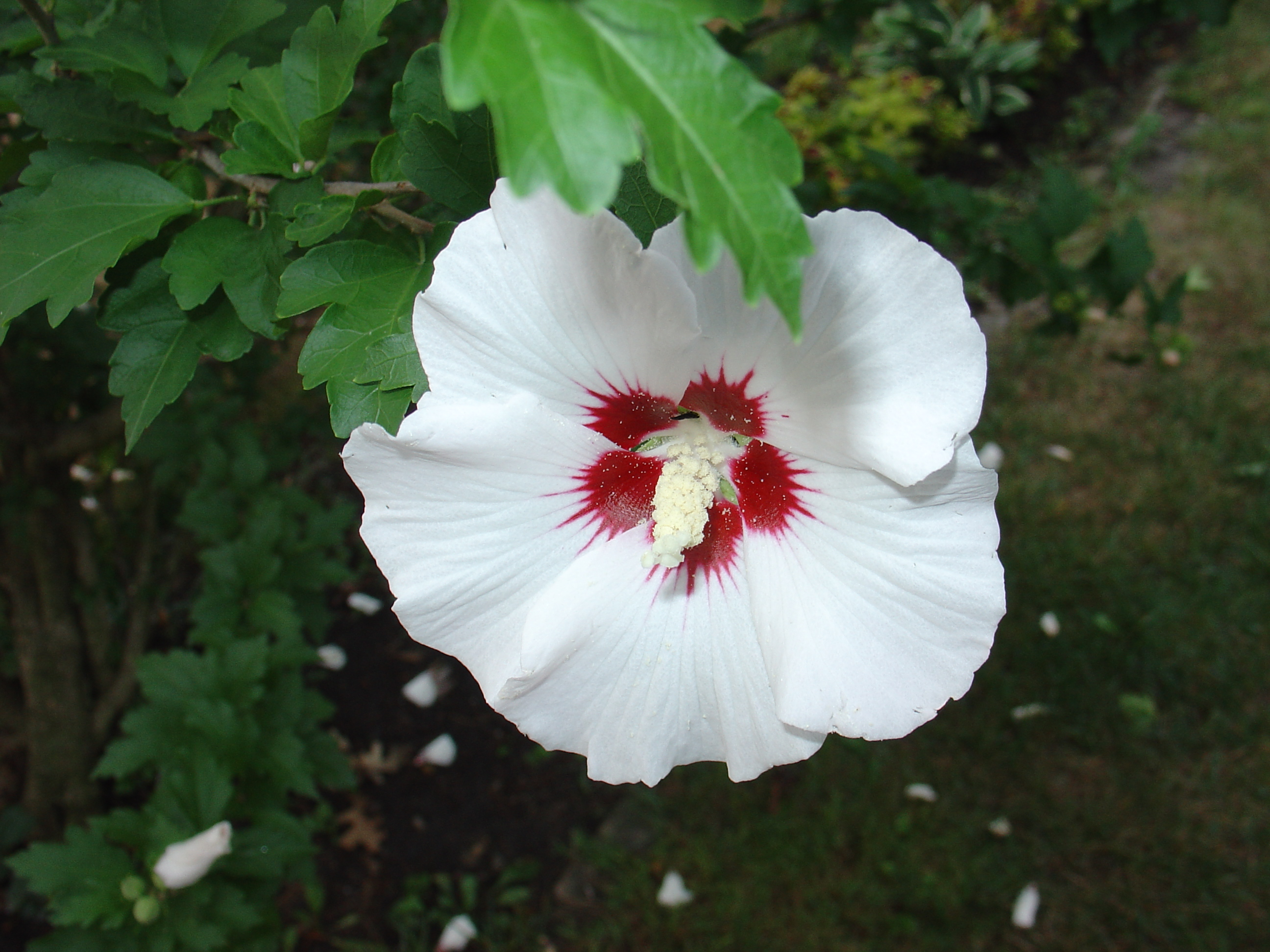 Hibiscus syriacus